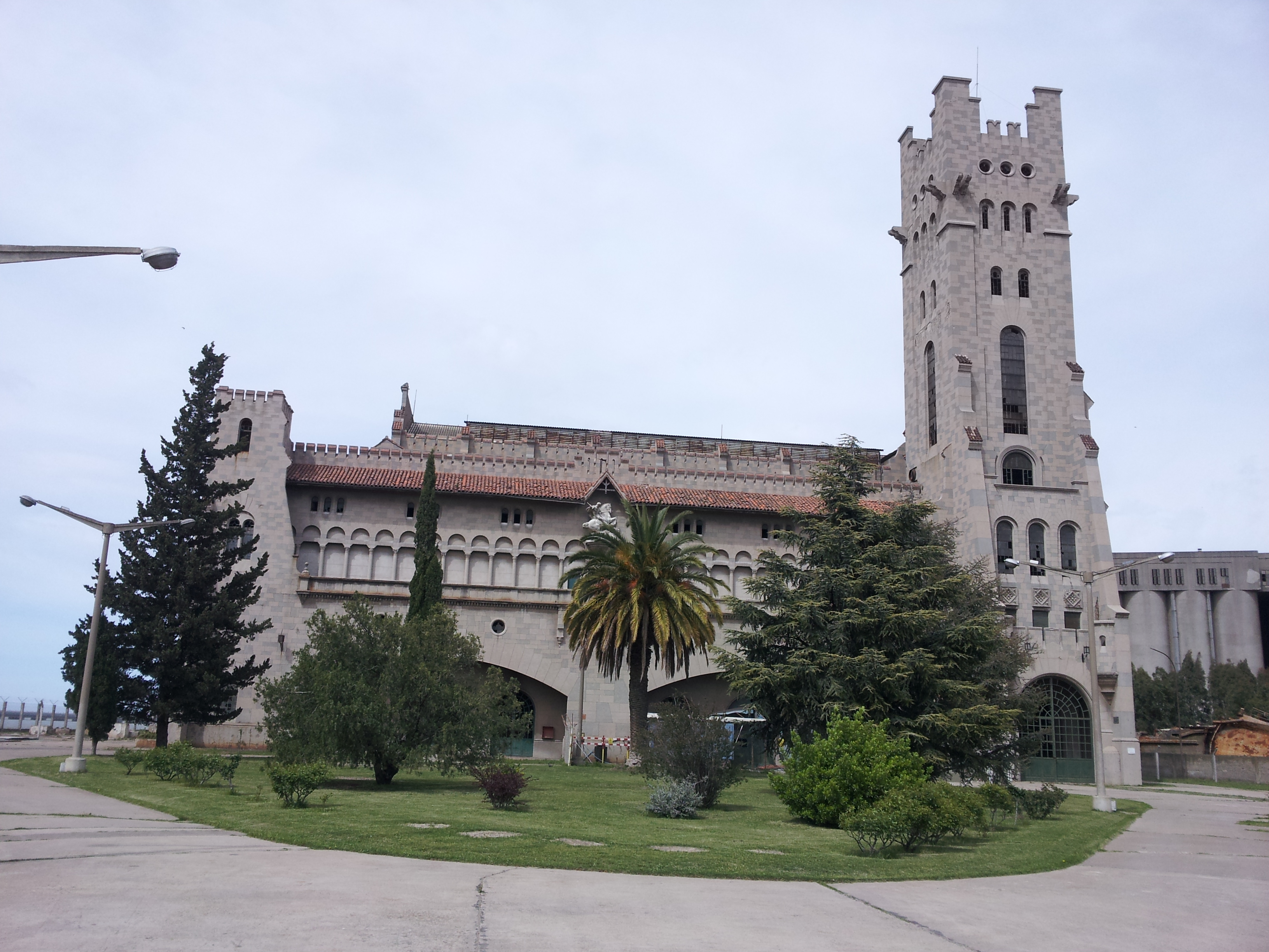 Ex Usina General San Martín de Ingeniero White